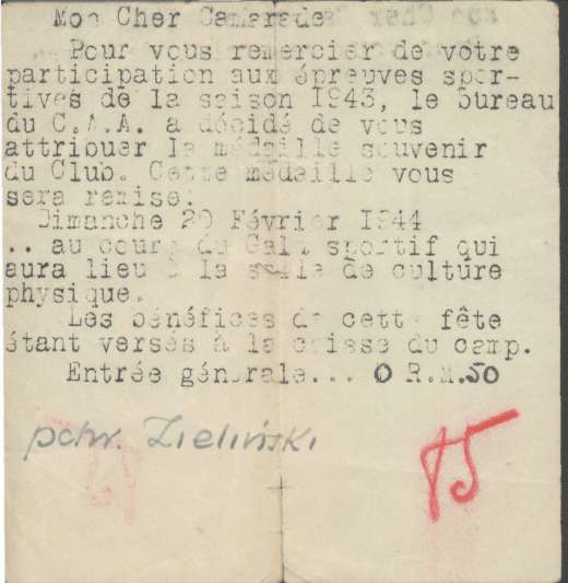 Zaproszenie na obozową "galę sportową" Prócz licznych zajęć obowiązkowych jeńcy mieli też czas na namiastkę życia kulturalnego i sportowego. Drogi kolego,W podziękowaniu za Pański udział w zawodach sportowych w sezonie 1943, biuro C.A.A. przyznało Panu pamiątkowy medal Klubu. Medal zostanie Panu wręczony w niedzielę 20 lutego 1944 w czasie Gali sportowej, która odbędzie się w sali wychowania fizycznego.Dochód z tego święta zasili kasę obozową.Wejście 0 R.M.50 Skrót C.A.A. trudny do rozszyfrowania, natomiast Wejście 0 R.M.50 oznacza prawdopodobnie cenę biletu zero przecinek pięćdziesiąt Reichsmark czyli po prostu pół marki obozowejZ archiwum domowego Henryka Zielińskiego, skan wykonałem osobiście--Julo 07:58, 30 sty 2005 (CET)